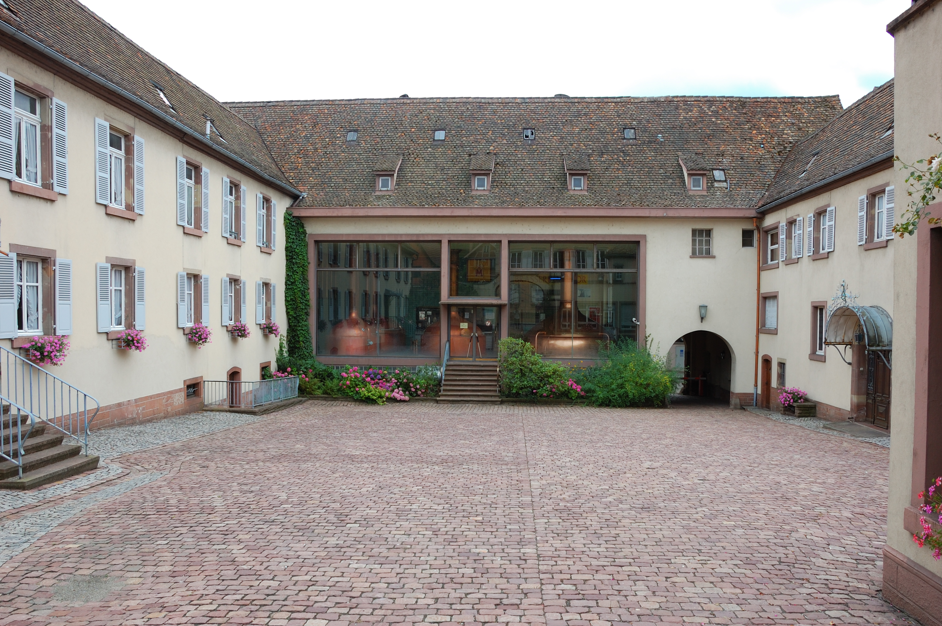 Brasserie Météor